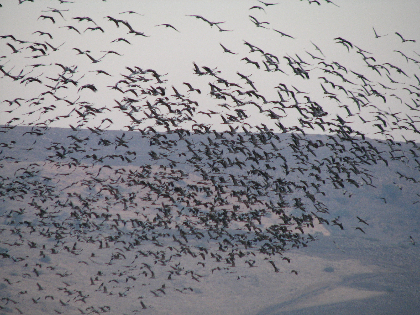 עגורים אפורים באגמון החולה